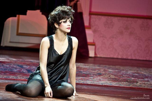 Judy Garland O Fim do Arci-Íris